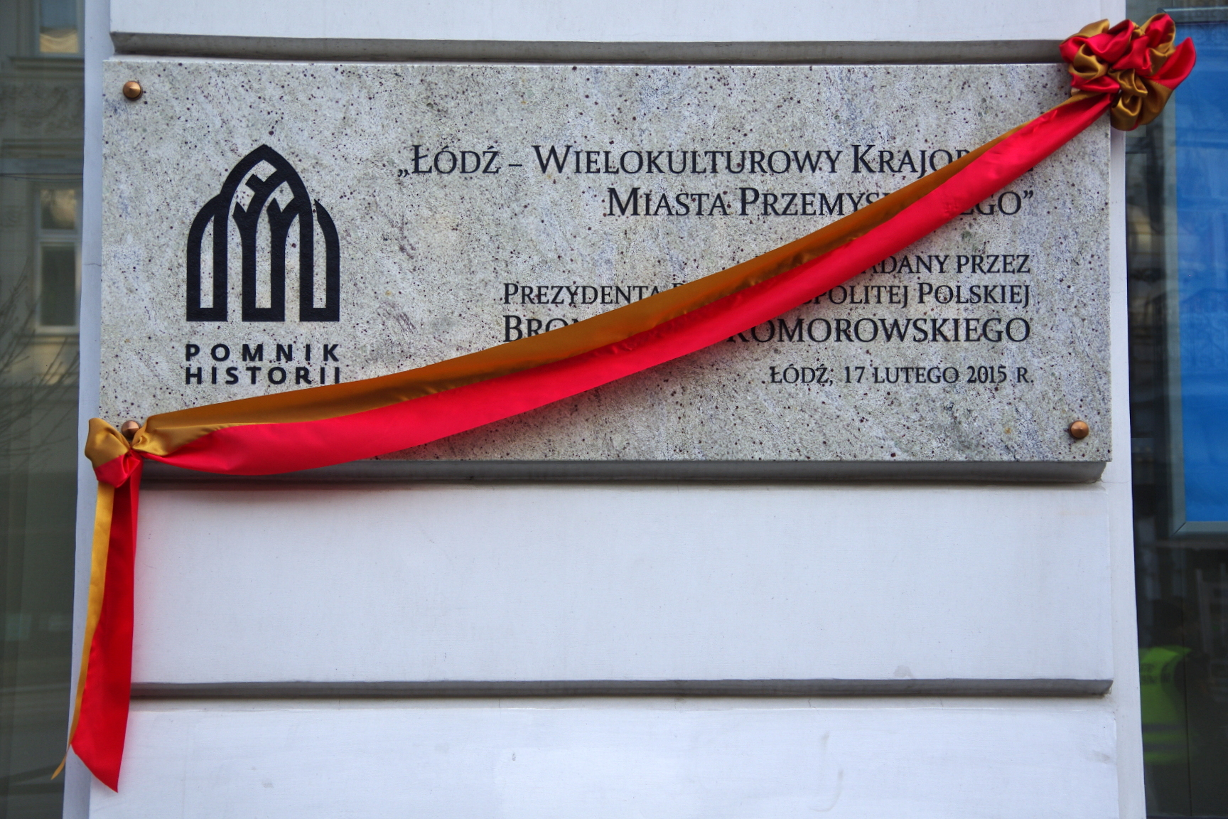 Przy ul. Piotrkowskiej 104 prezydent RP Bronisław Komorowski odsłonił tablicę pamiątkową o przyznaniu Łodzi statusu pomnika historii